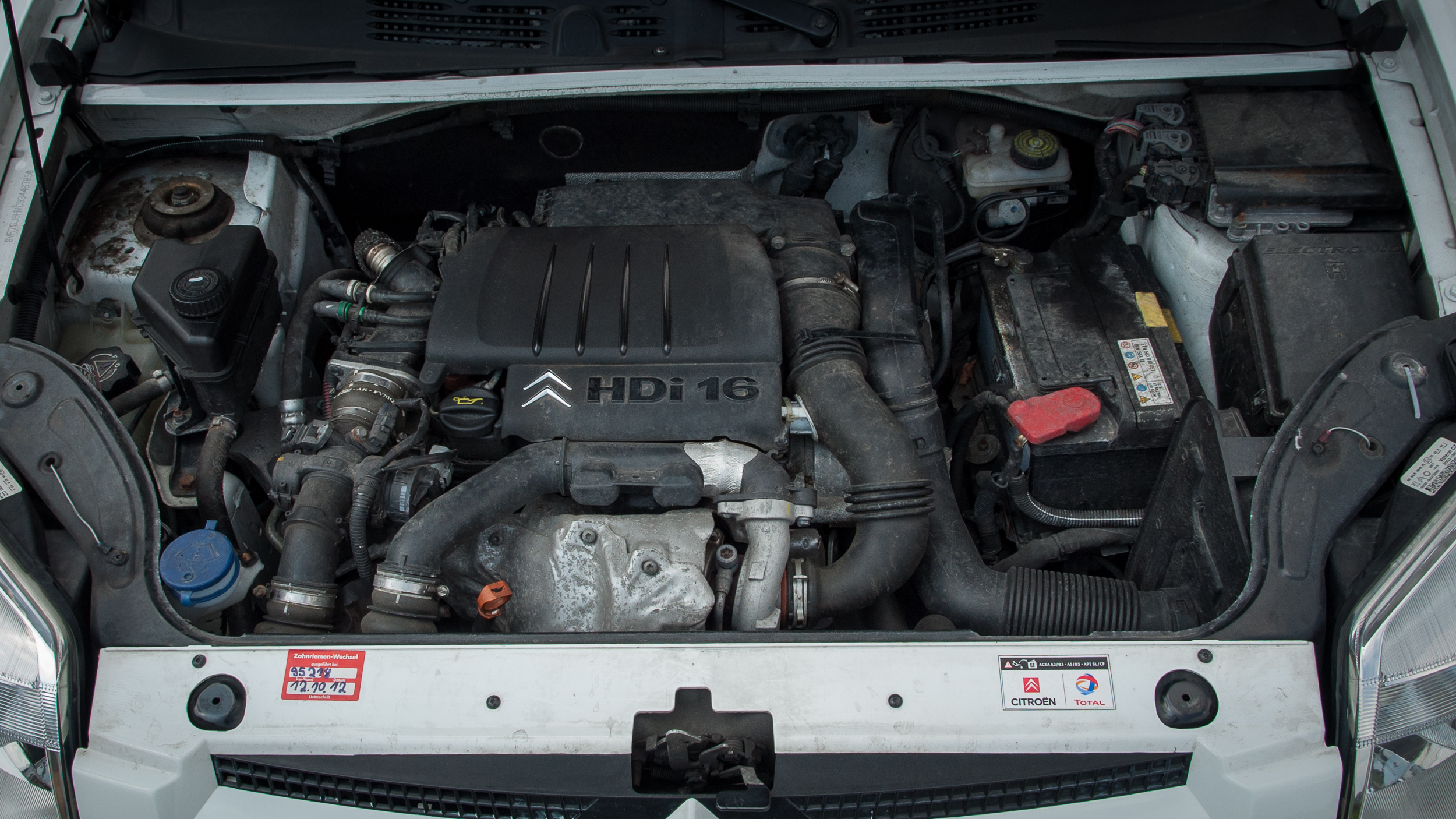 Motor DV6BTED4 in einem Citroen Berlingo 1,6 HDI 75